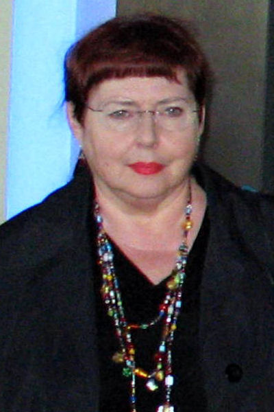 Hildegard Alex bei der Filmpremiere Max Minsky und ich, Berlin, 2.9.2007